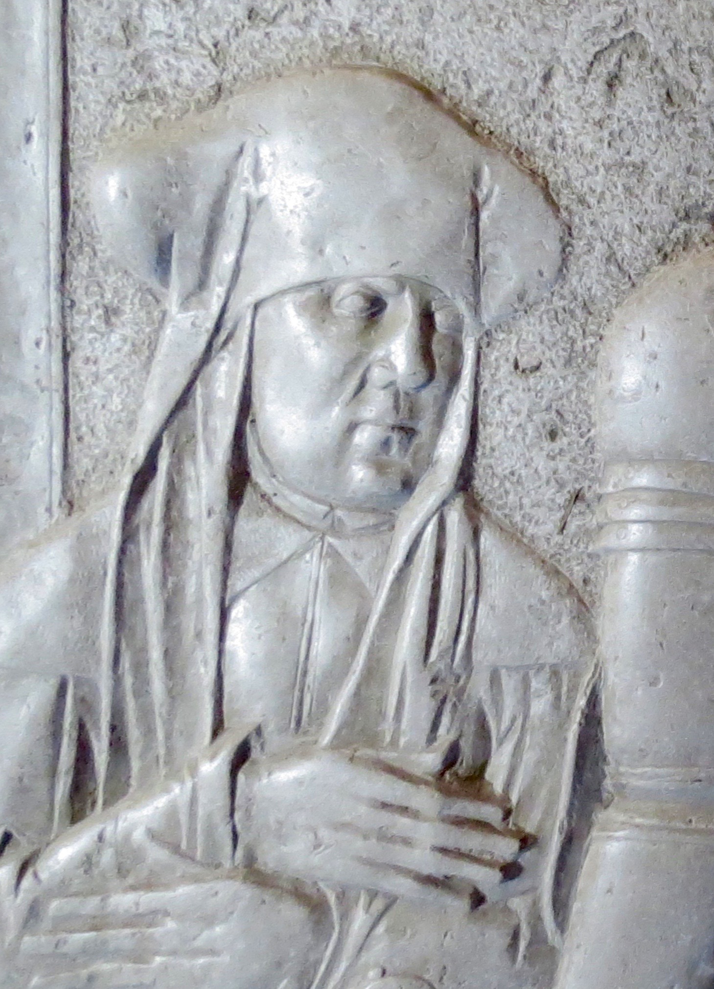 Anne Mouritsdatter Gyldenstierne, detalje fra gravsten med sønnen Mourids Krognos og hans hustru Eline Gøye, Skt. Bendts Kirke, Ringsted